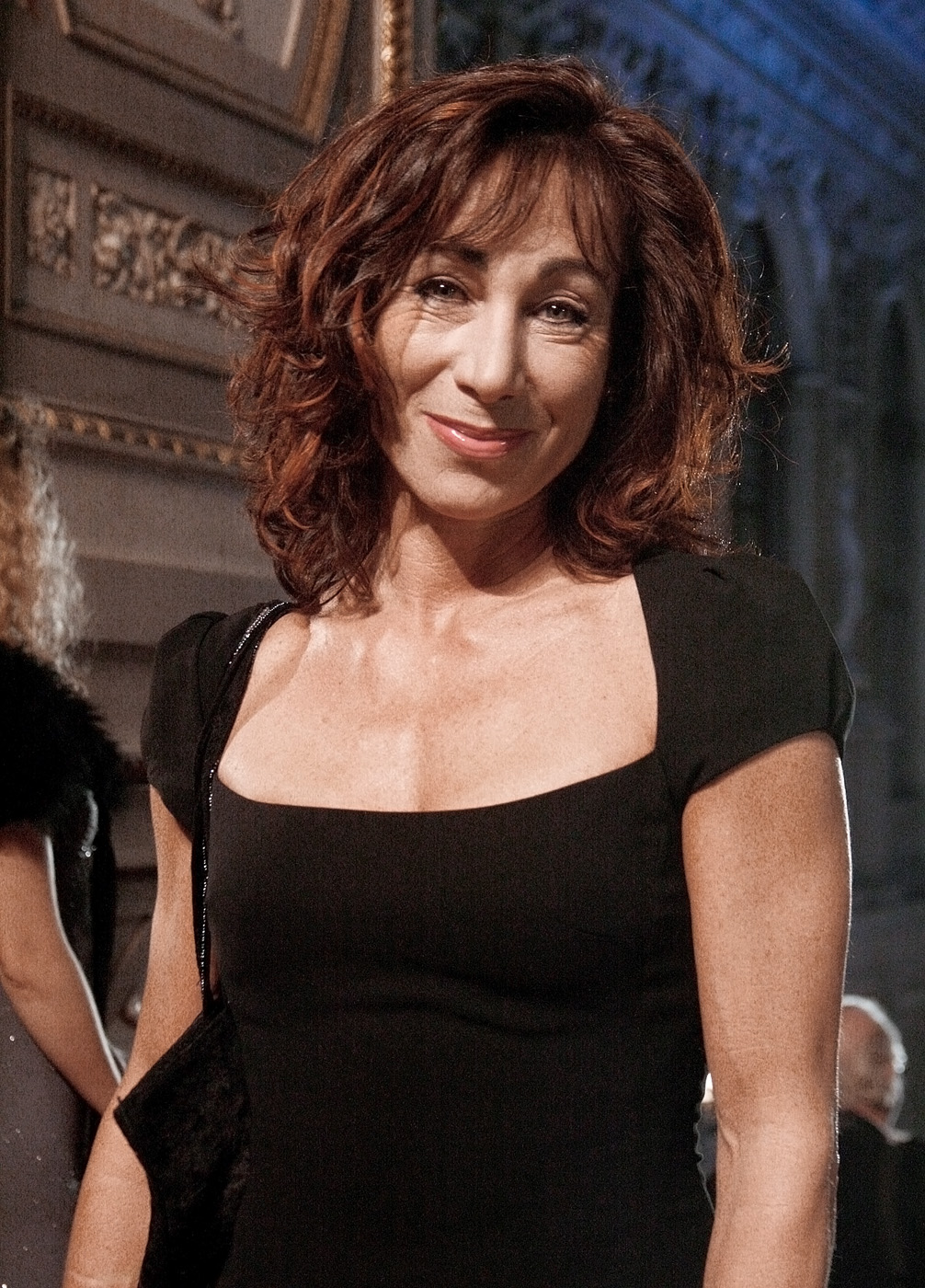 Andrea Eckert zu Gast bei der Verleihung des Nestroy-Theaterpreises 2010 im Burgtheater in Wien.